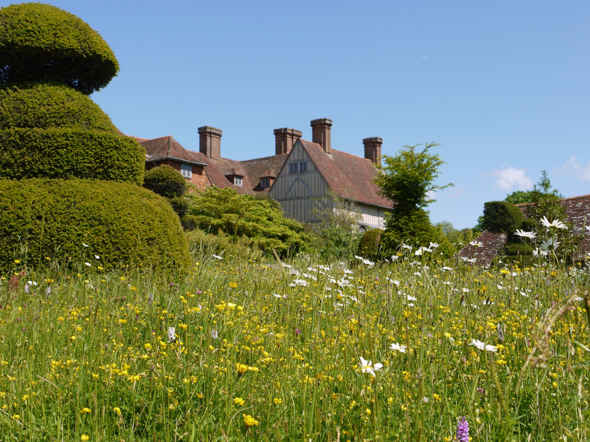 Great Dixter: Blick auf das Haus über eine Blumenwiese, vorbei an einer Eibe in Formschnitt